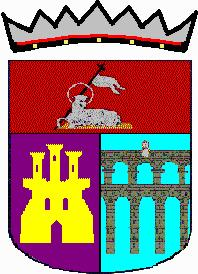 Escudo de Etreros (Segovia)